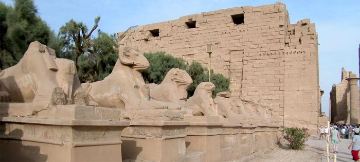 Vhod v tempelj Karnak